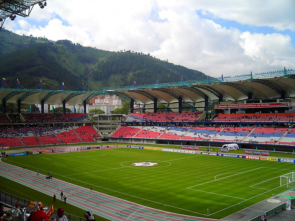 merida